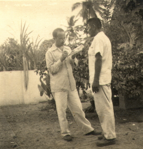 Geraldo Lapenda com o índio fulni-ô Lourenço (acervo pessoal - familiar)